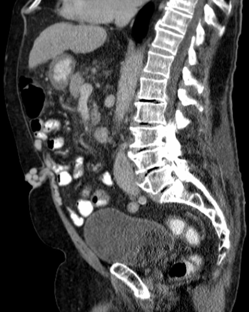 Caput medusae bei Pfortaderhochdruck bei Leberzirrhose in der Computertomographie. (sagittal)